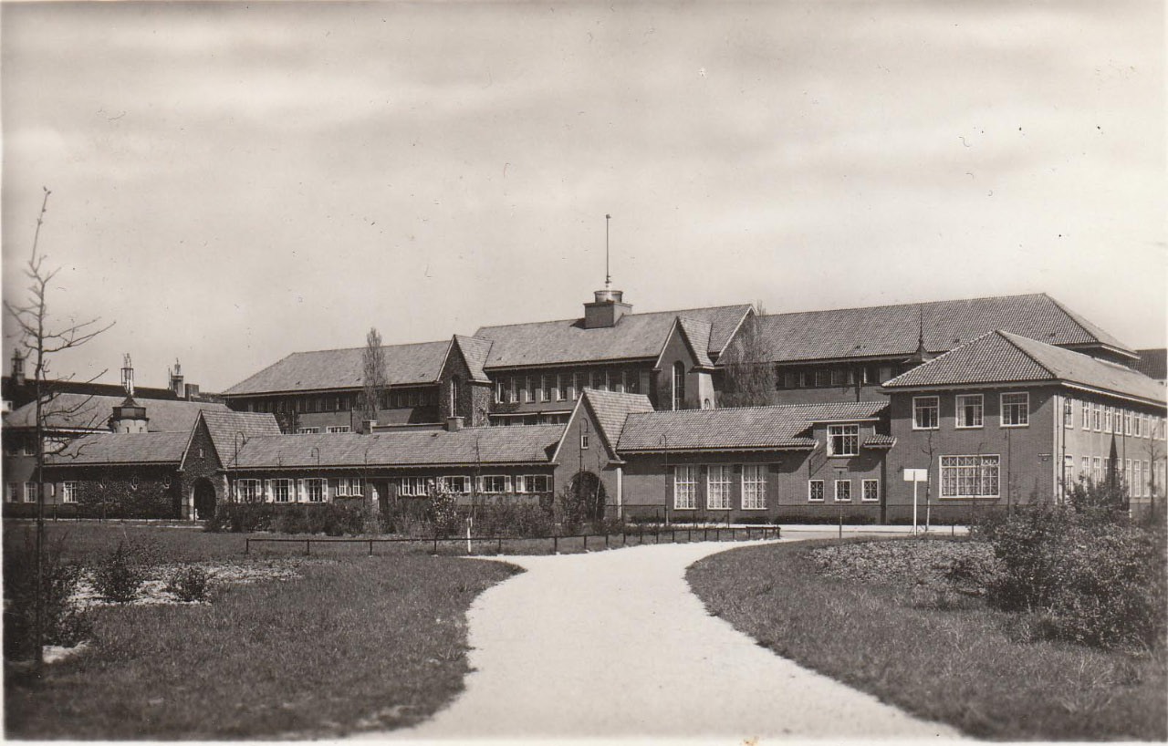 Wielingenstraat, Hier stond het Diaconie Weeshuis der Ned Herv Gemeente.